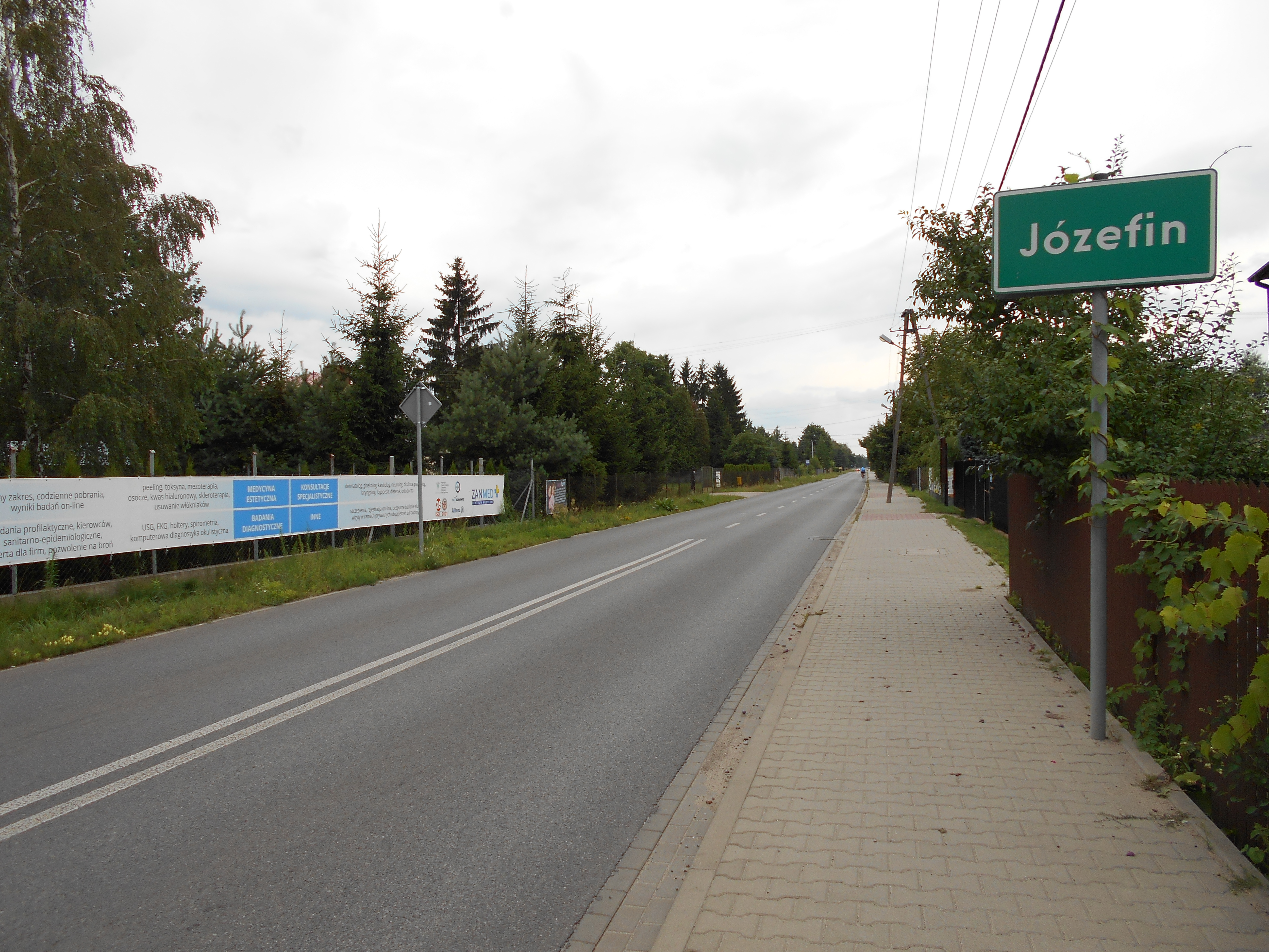 Józefin - wieś w gminie Halinów